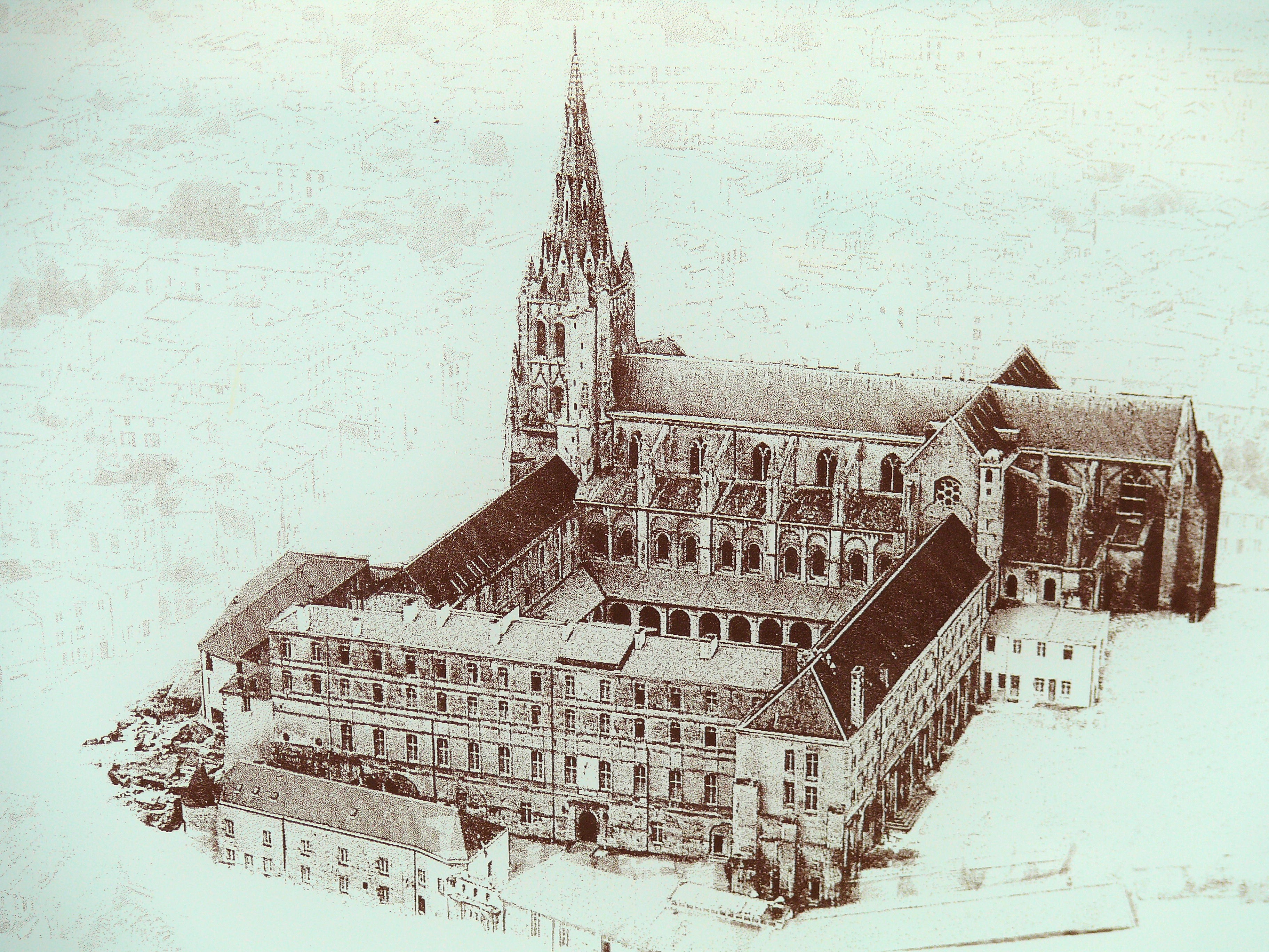 Saint-Maixent-l'Ecole - Plan de l'abbaye